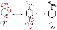 referencia Hiperconjugação_negativa